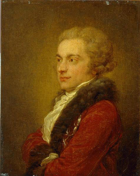 Граф Григорий Иванович Чернышев(1762-1831)